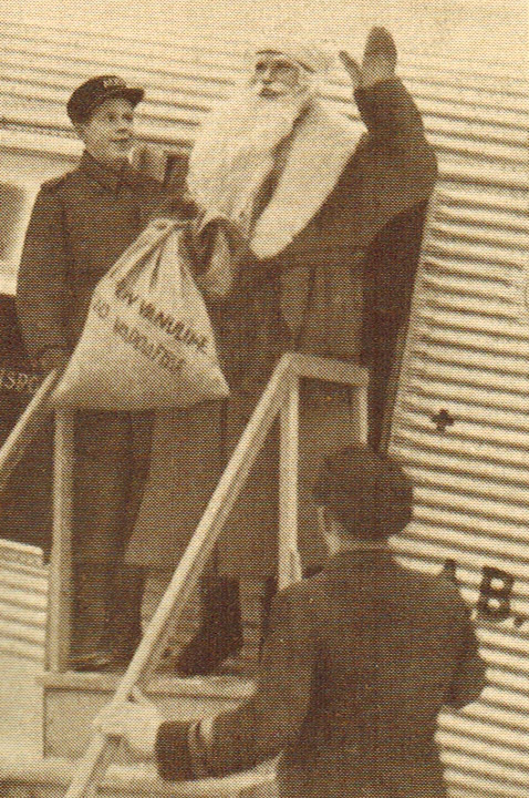 Turun Vanun joulupukki 1936